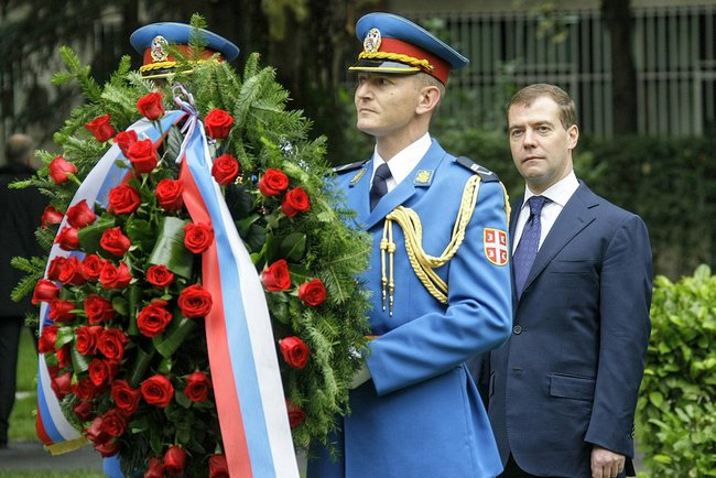 Возложение венка к Монументу освободителям Белграда и Монументу советским воинам.